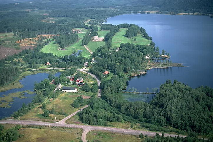 Motiv: Saxåhyttan Nyckelord: Flygbilder, Riksintressen Kategori: Bergslagsmiljö Saxåhyttan. Riksväg 63 går förbi.